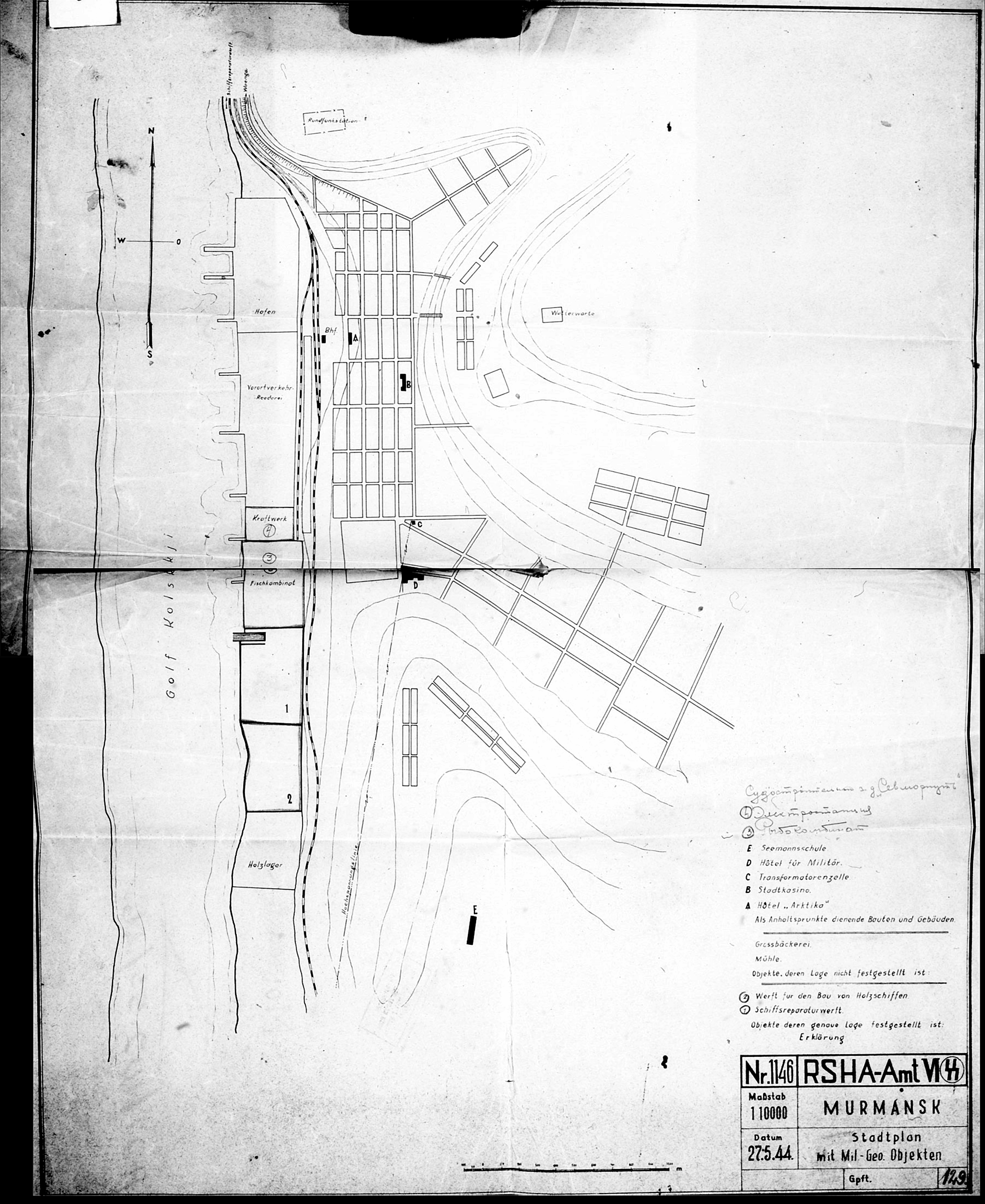 План-схема города Мурманска 1944 года, №1146, подготовленная в VI Департаменте (Amt VI) Главного Управления Имперской Безопасности (RSHA) Германии.